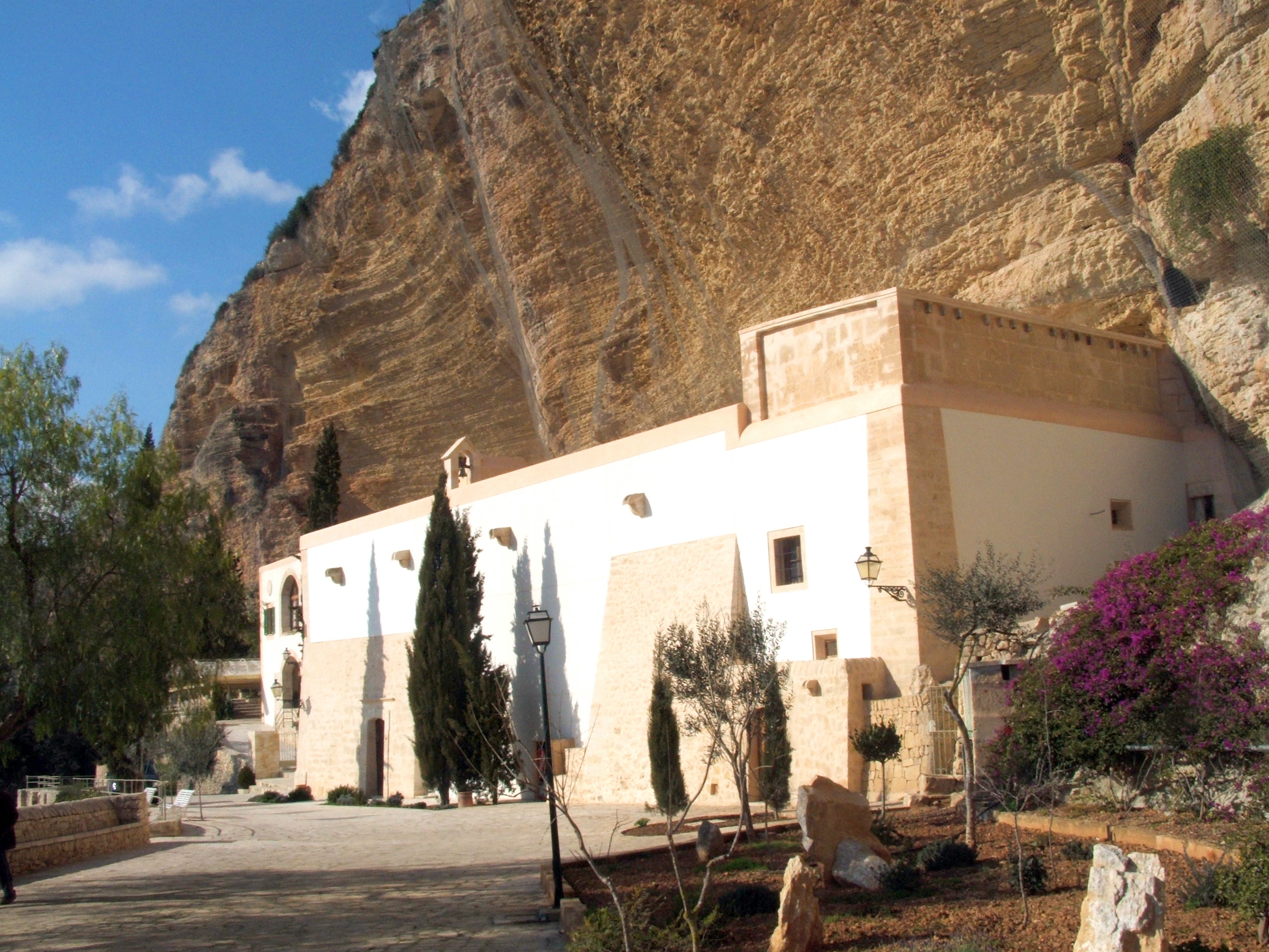 Monastery Mare de Déu de Gracia in Randa, Mallorca